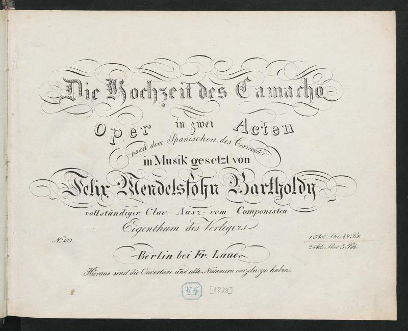 Felix Mendelssohn Bartholdy Die Hochzeit des Camacho Klavierauszug Laue 1828 Titelblatt